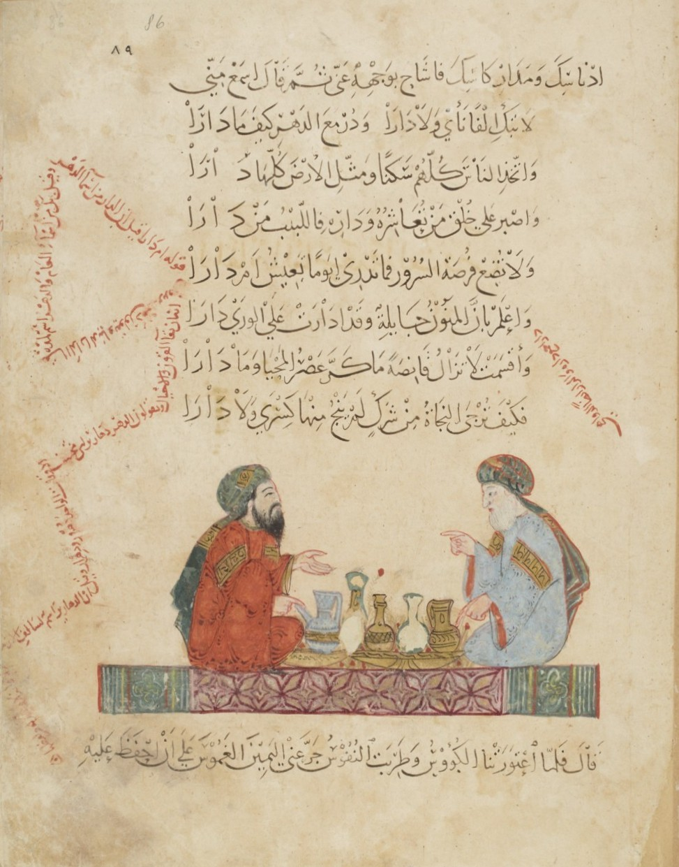 Folio 86r Source : Bibliothèque nationale de France, Département des manuscrits, Arabe 5847